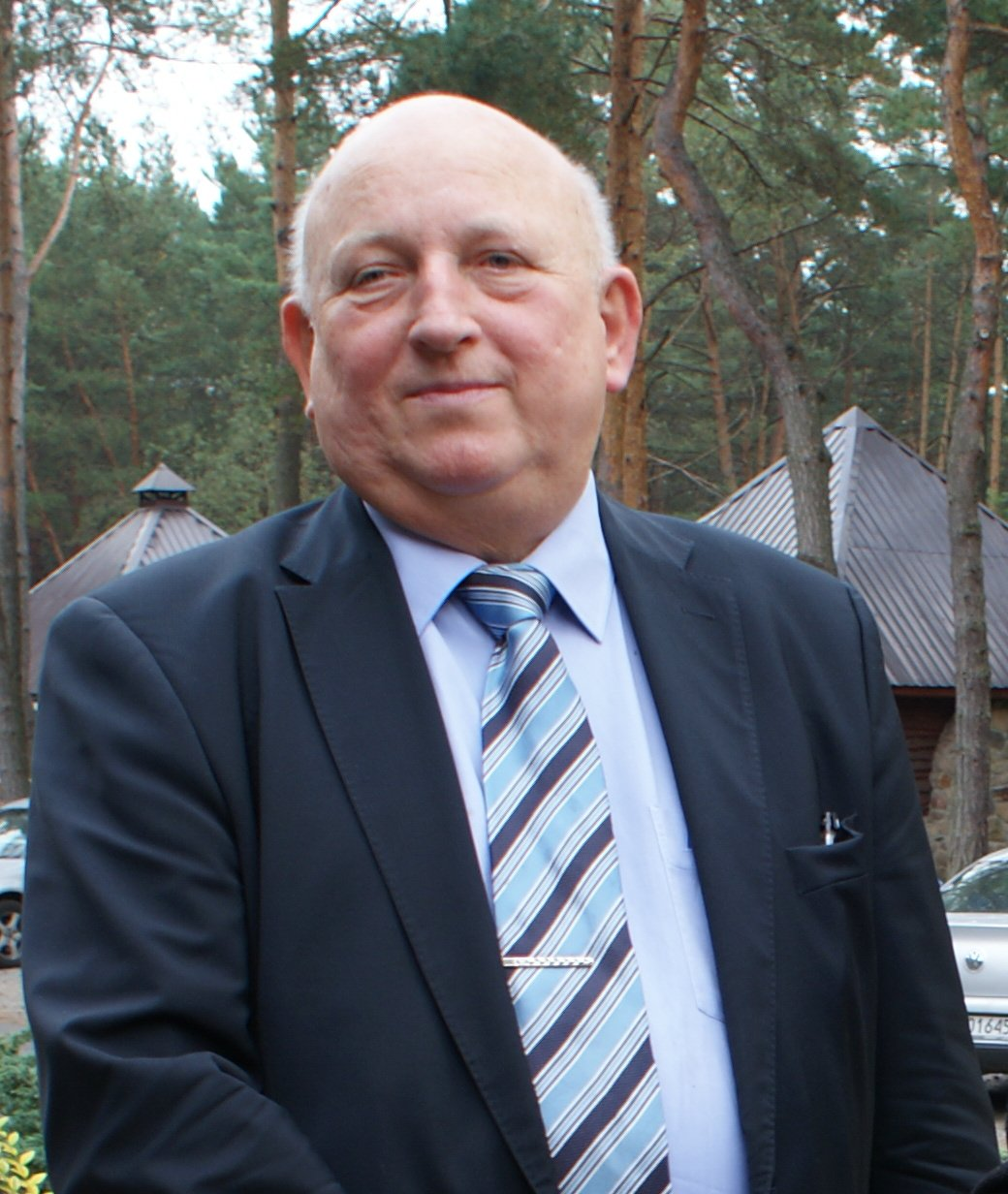 Józef Oleksy na spotkaniu z liderami Szkoły Liderów Społeczeństwa Obywatelskiego (XIX SLSO)